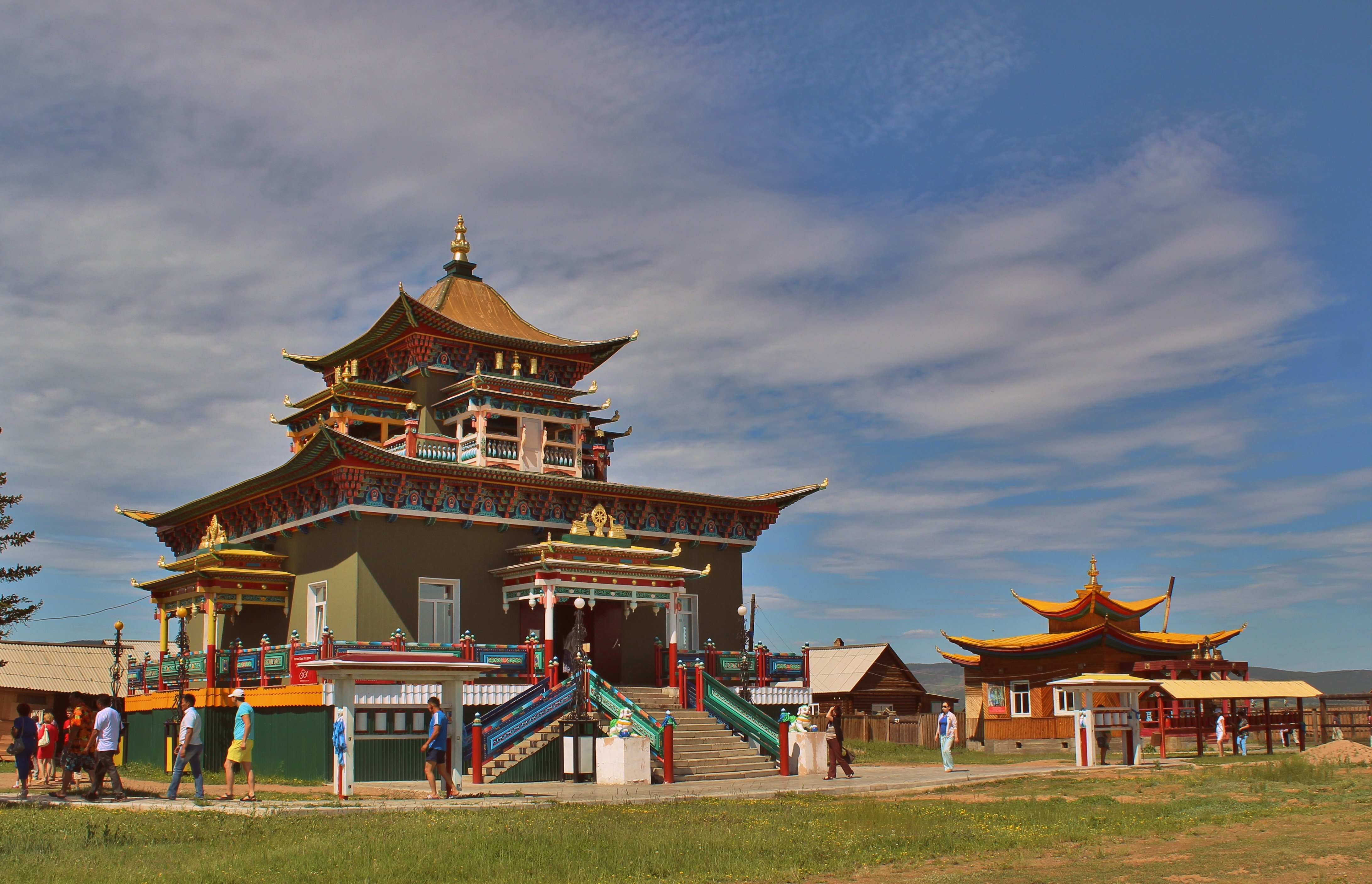 Дуган Зеленой Тары в Иволгинском дацане, Бурятия